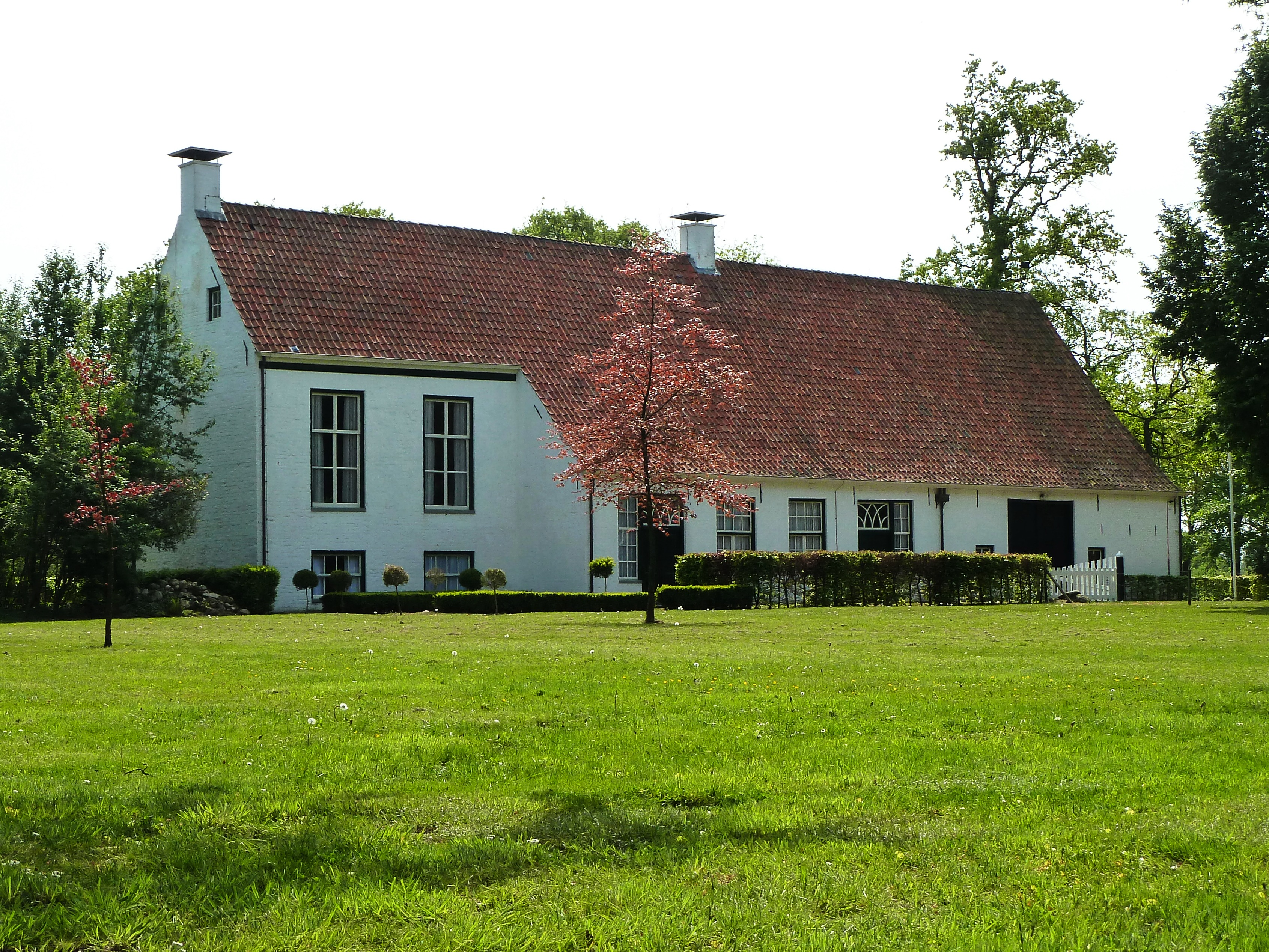 Iwema-steenhuis nabij Niebert (Marum, Groningen, Nederland).